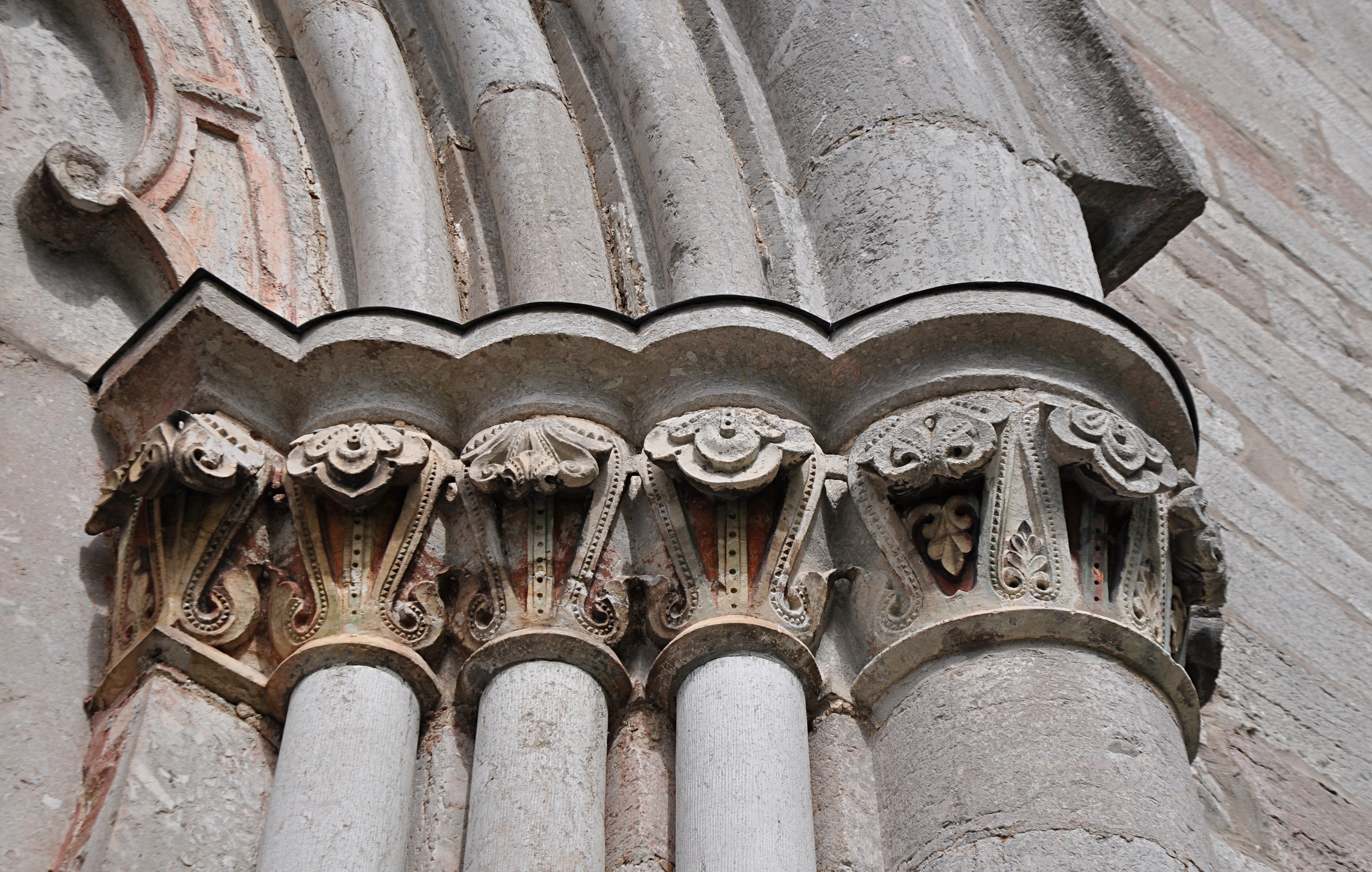 GOTLAND BRO KYRKOGÅRDEN 1:1 - husnr 1